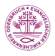 Evangelischer Kirchenkreis Oderbruch